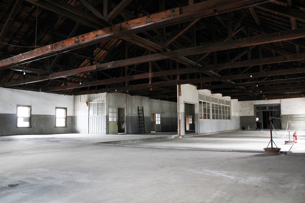 吉野町煉瓦倉庫の内部、2016年6月27日に撮影